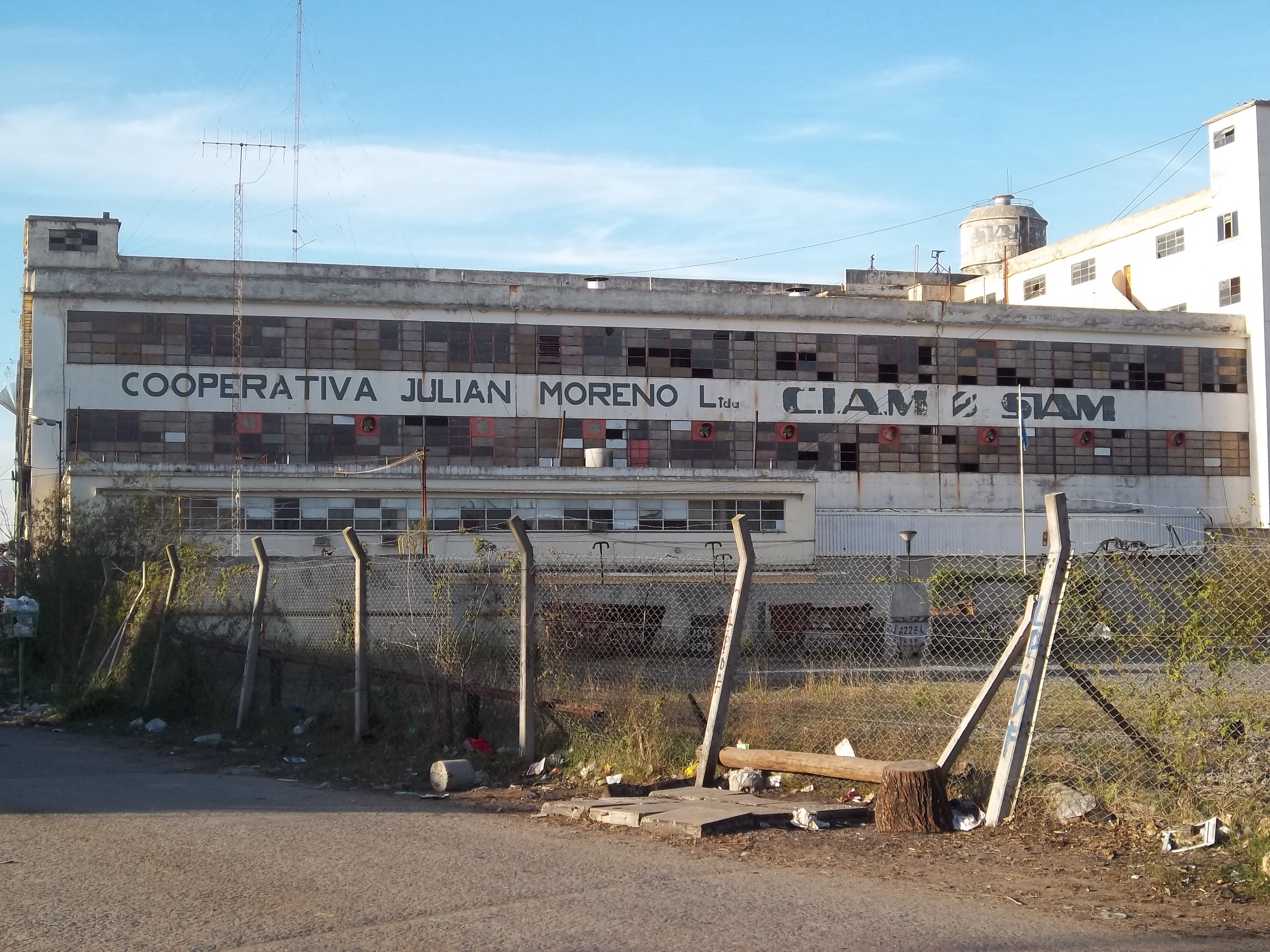 Frente de la fábrica SIAM en Piñeyro, partido de Avellaneda, provincia de Buenos Aires, Argentina.